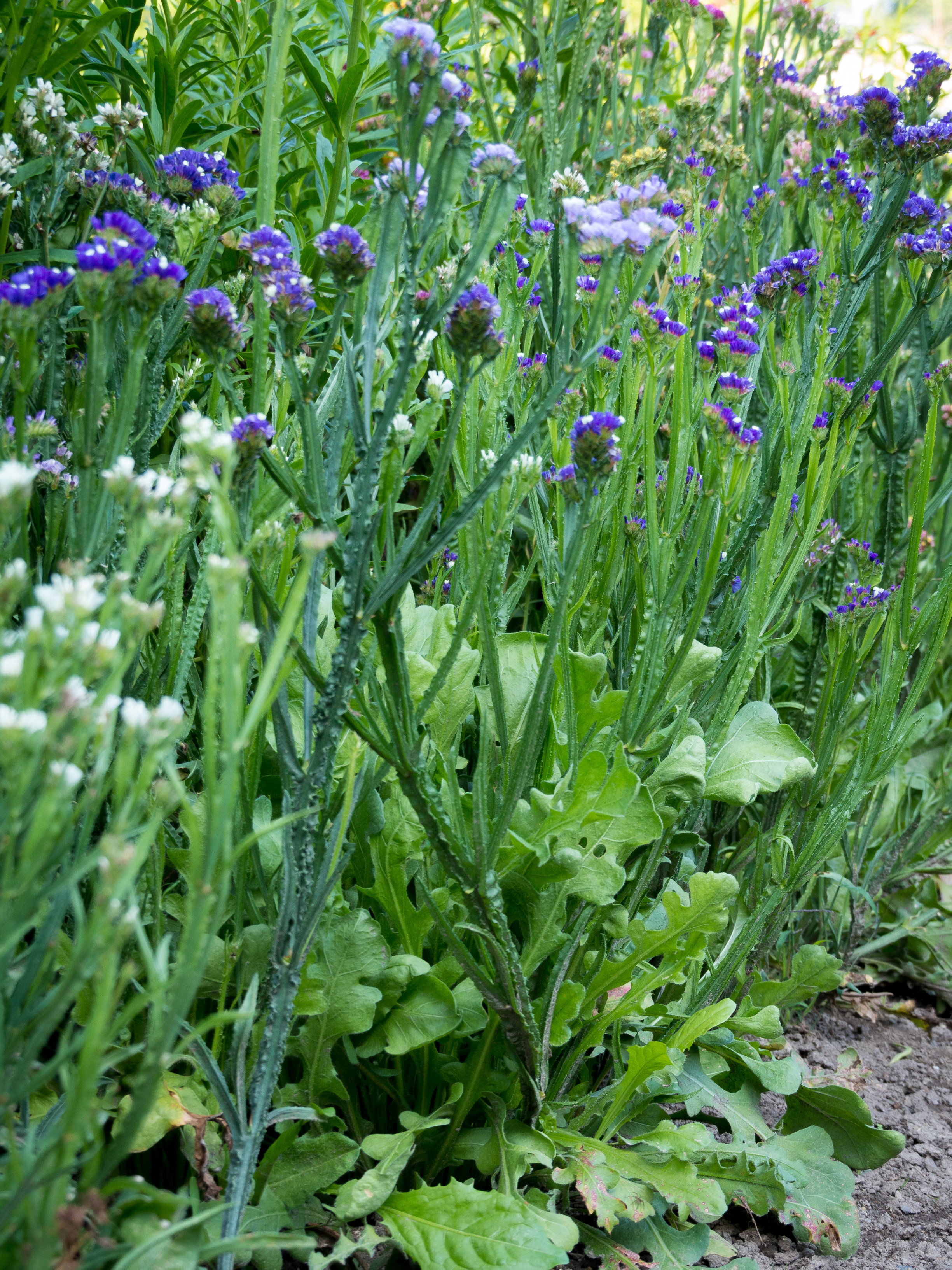 Der Geflügelte Strandflieder, lat. Limonium sinuatum